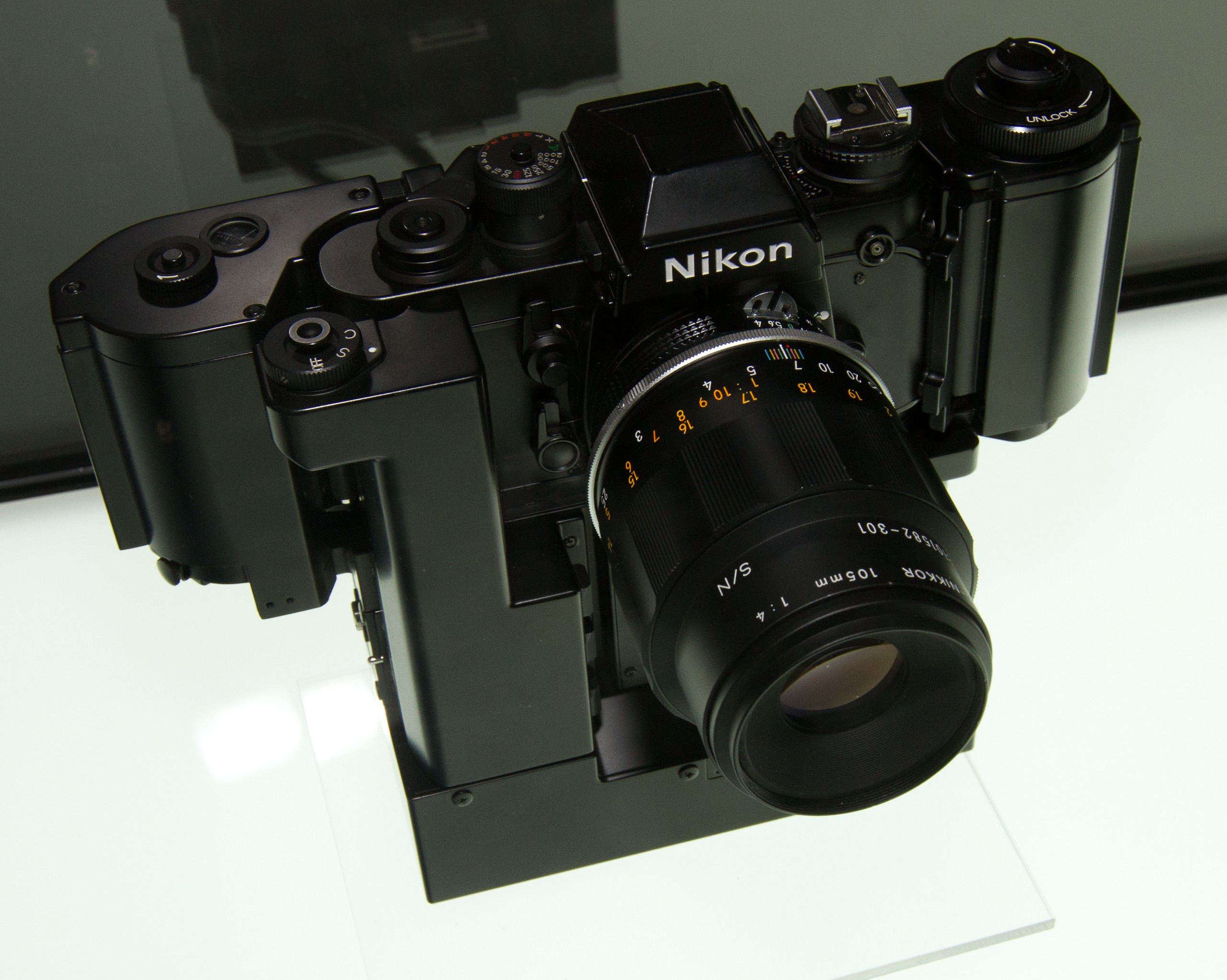 CP+ 2012: 1981 Nikon F3 Big Camera NASA Modified